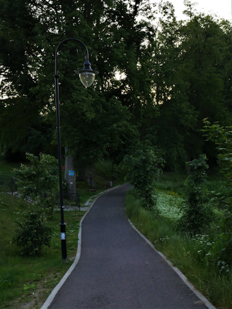 Wejście do alei fiozofów